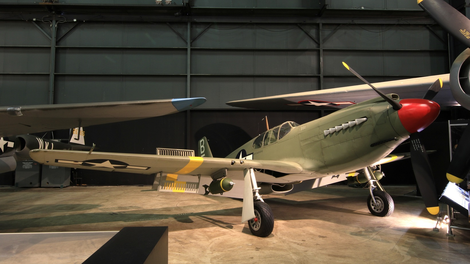 North American A-36A / National Museum of the U.S. Air Force / 2015年7月26日撮影